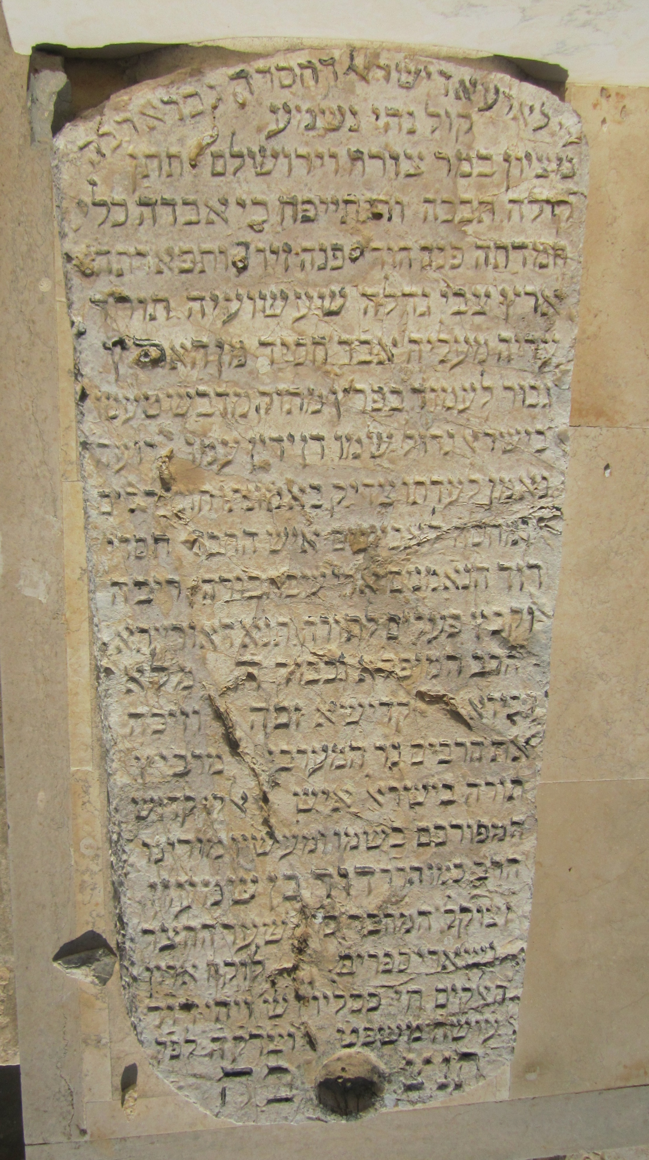 קבר הרב דוד בן שמעון - צוף דבש בהר הזיתים בירושלים